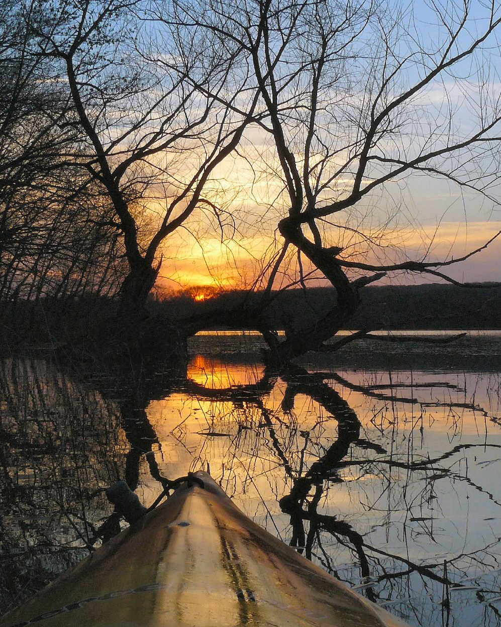 Kayaking by Sunset, Lake Okmulgee